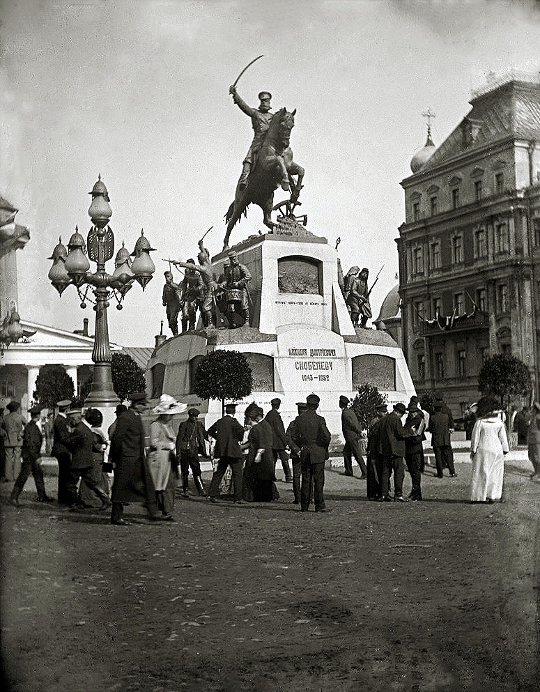 Москва. Памятник генералу М.Д.Скобелеву на Тверской пл. 1913-1917гг (скульптор П.А.Самонов).